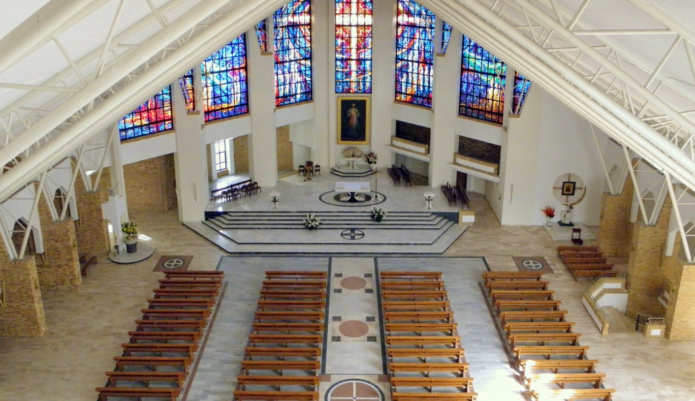 Kościół parafii Miłosierdzia Bożego w Stargardzie